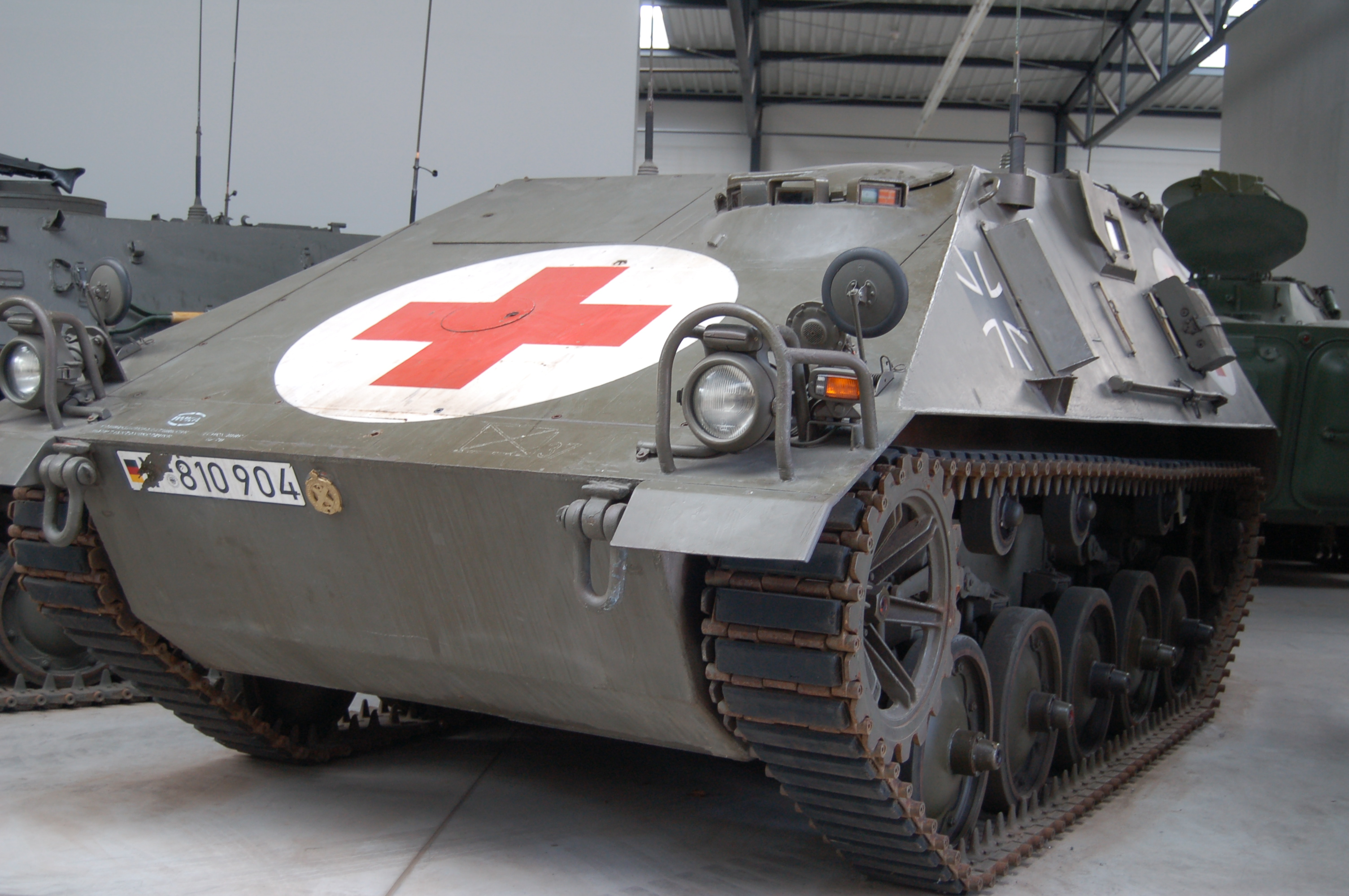 Schützenpanzer (kurz) / Krankenkraftwagen gepanzert (KrKwGep) Besatzung: 4 Soldaten Gewicht: 8,0 Tonnen Motorleistung: 121 kW (164 PS) Bewaffnung: Keine Besonderheiten: 2 Feldtragen Baujahr: 1959 - 1964 Stückzahl: 350